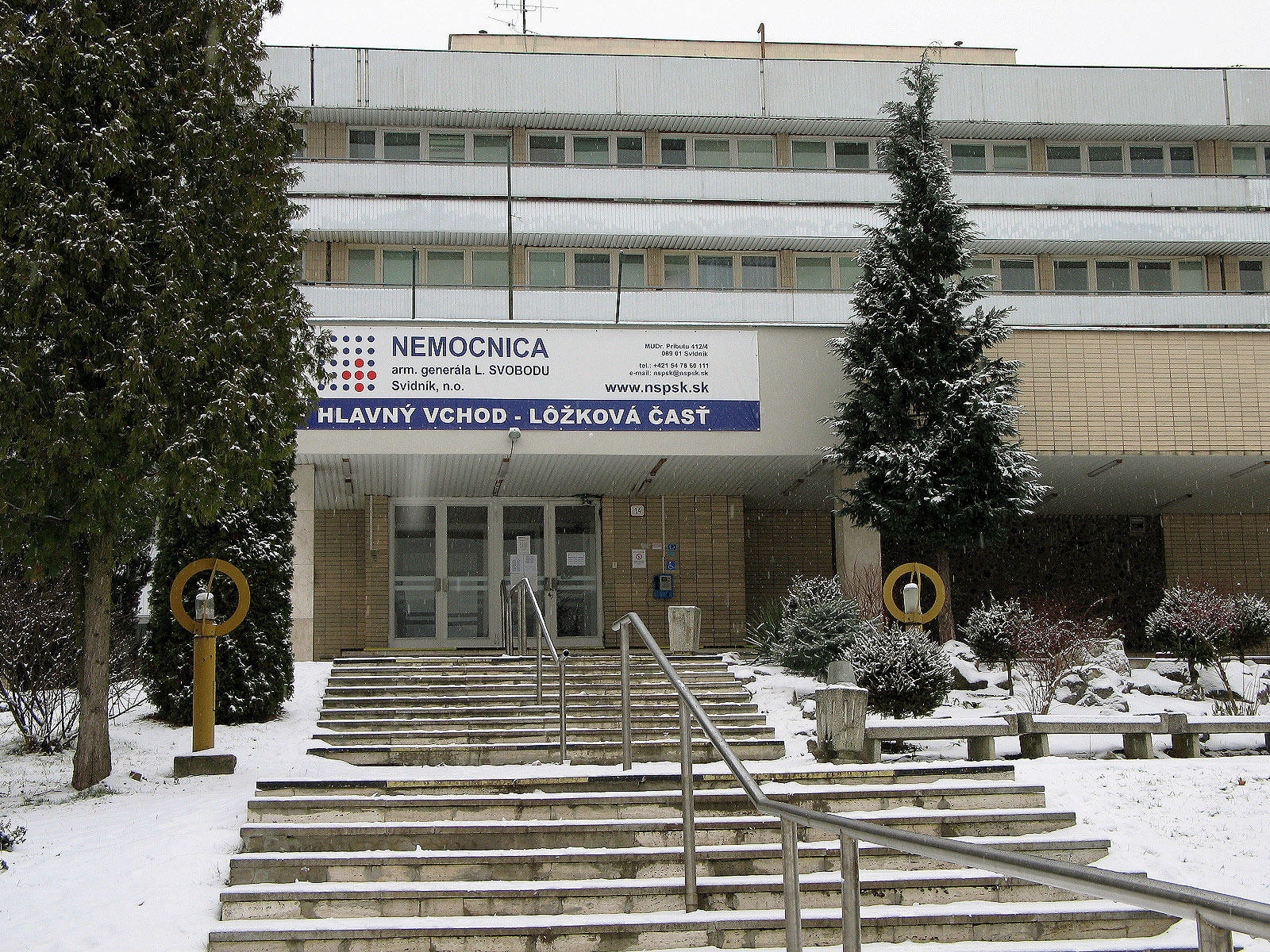 Portál do lôžkovej časti nemocnice